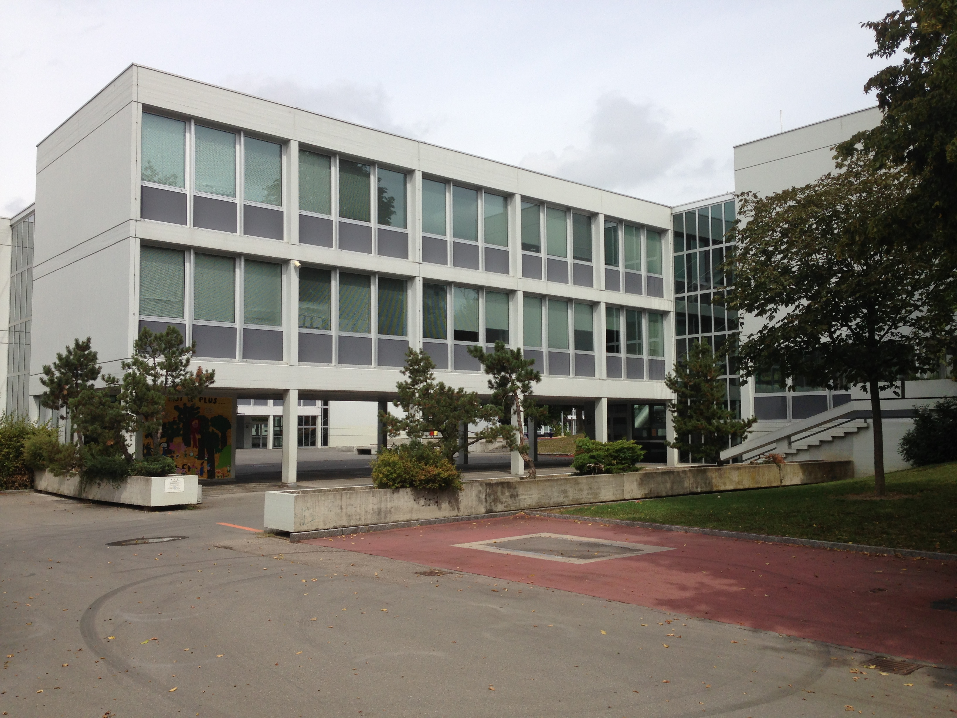 École de la cité du Lignon